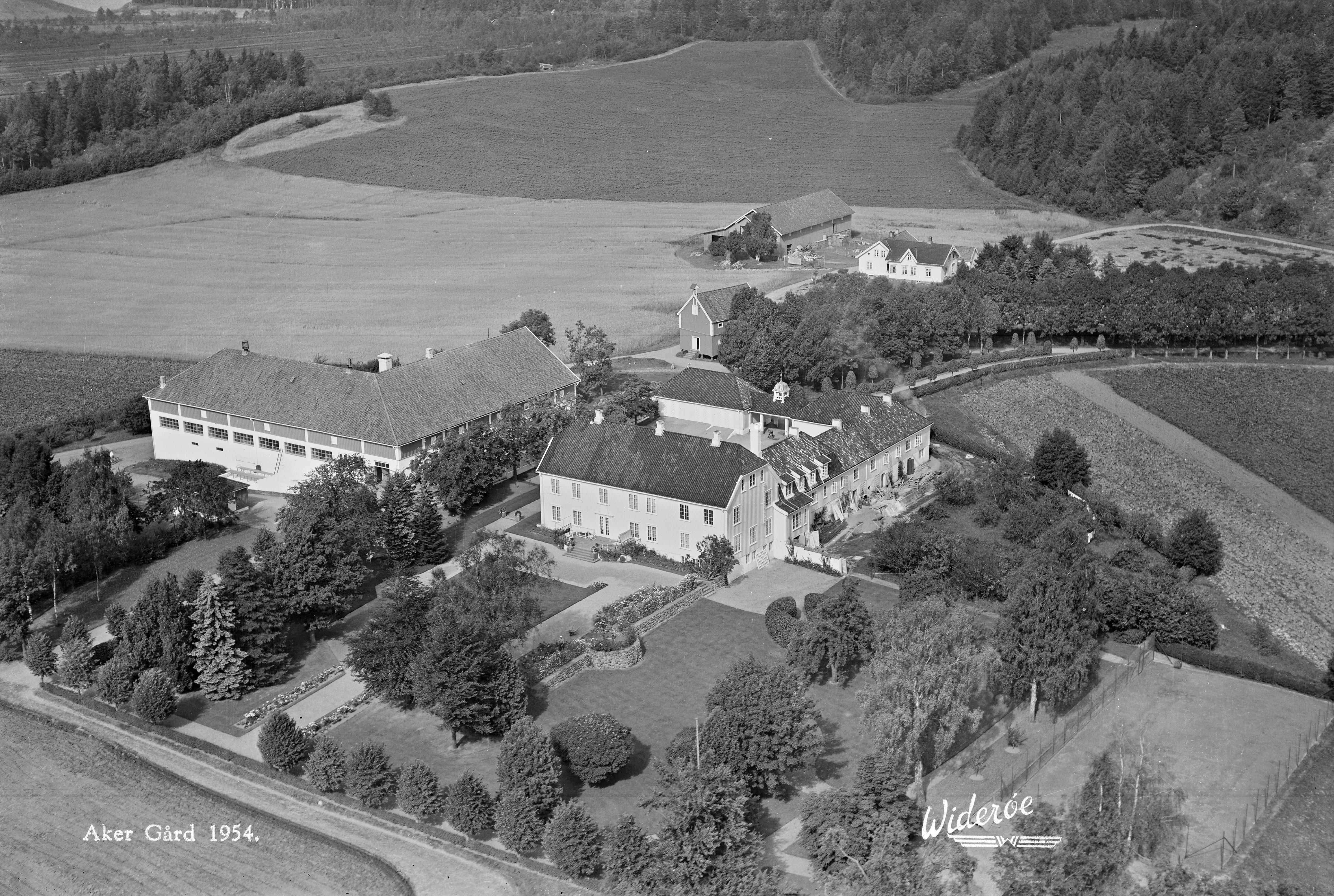 WF.S.Uten_Nummer_Akergård